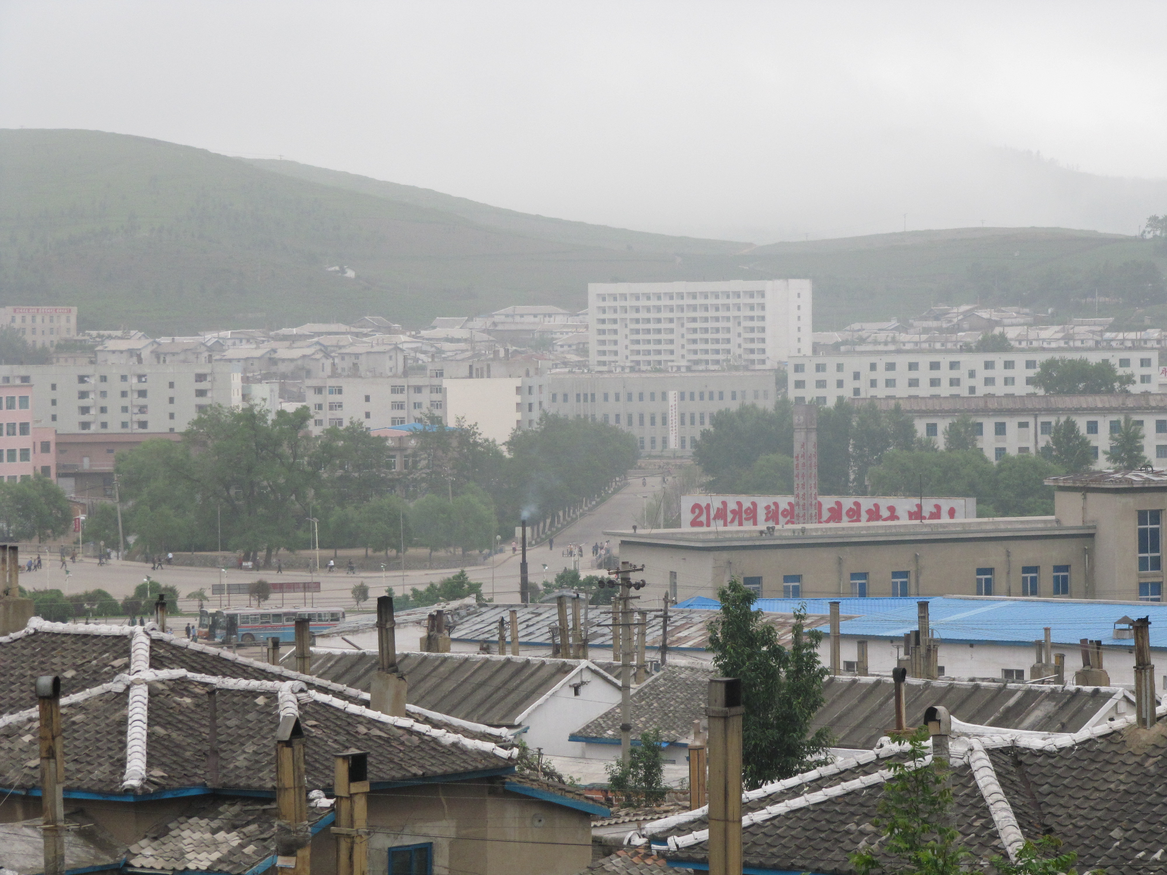 Rajin